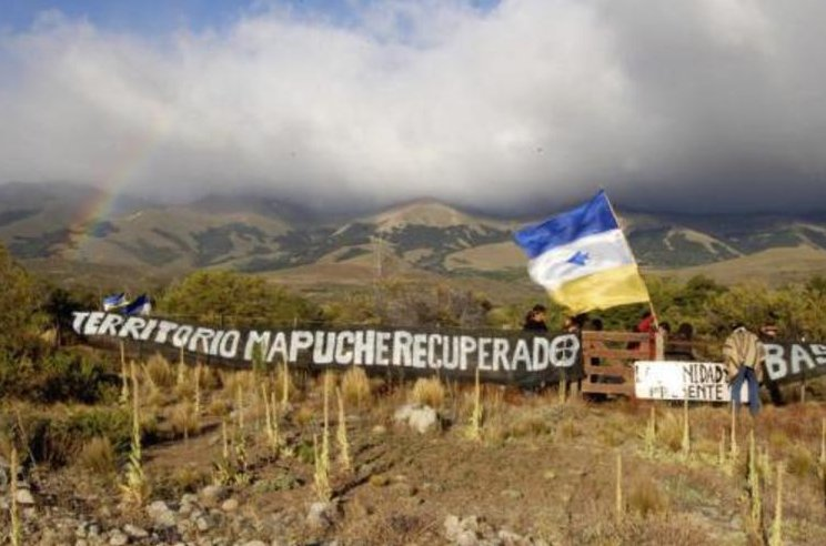 Lof Mapuche ocupando en Chubut (Argentina) tierras de propiedad de Benetton, reclamadas como ancestrales bajo el amparo de la Constitución argentina (art. 75 CN, inc 17).